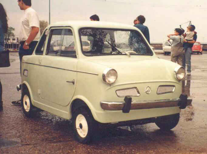 Es una foto del microcoche Dinarg D-200, solo se fabricaron 200 de estos autitos.